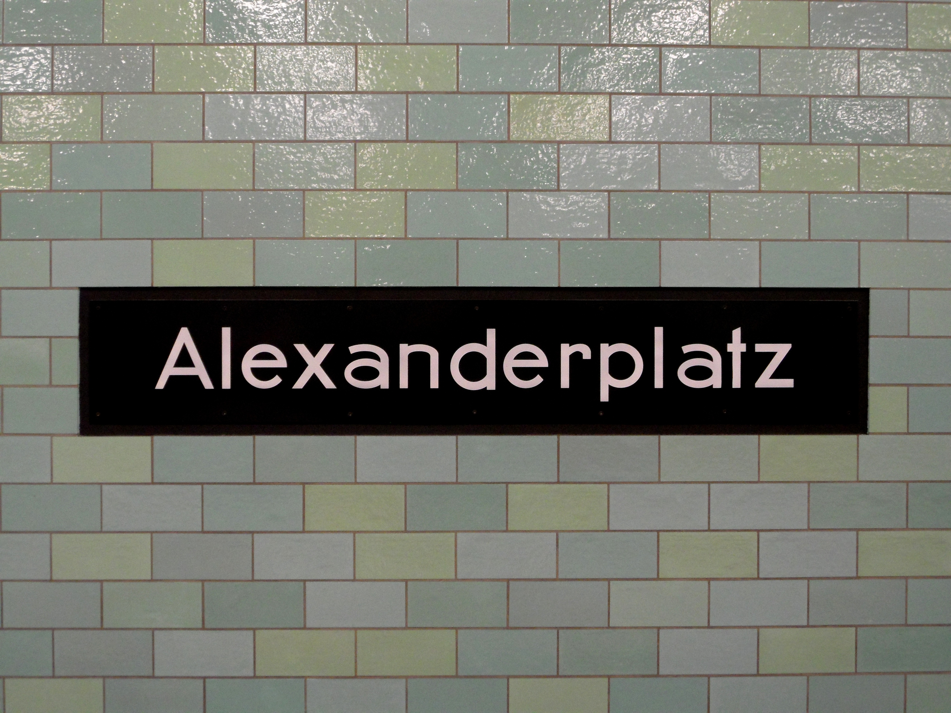 Berlin - U-Bahnhof Alexanderplatz - Bahnsteig der U5